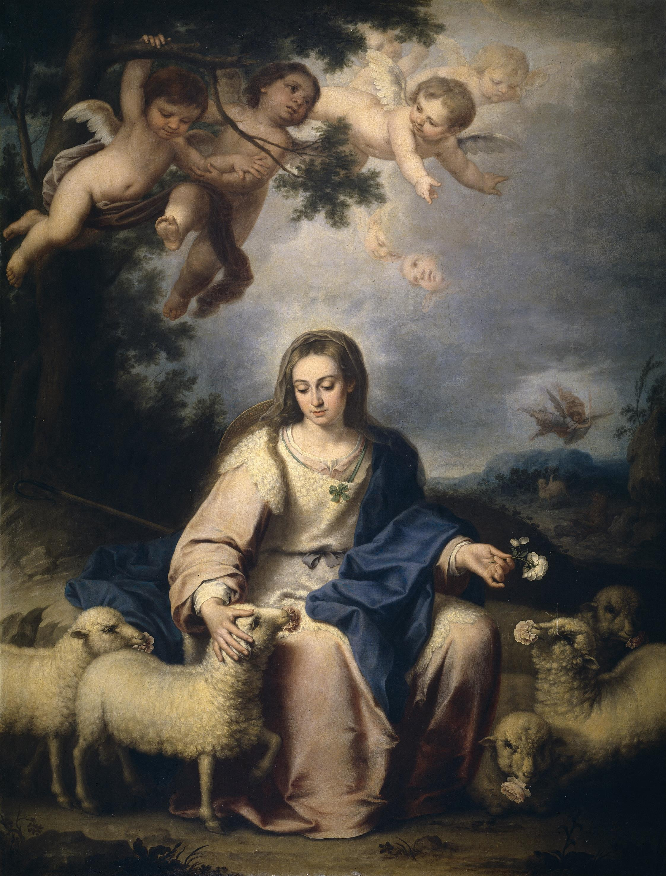 La obra representa a la Virgen María como la Divina Pastora.